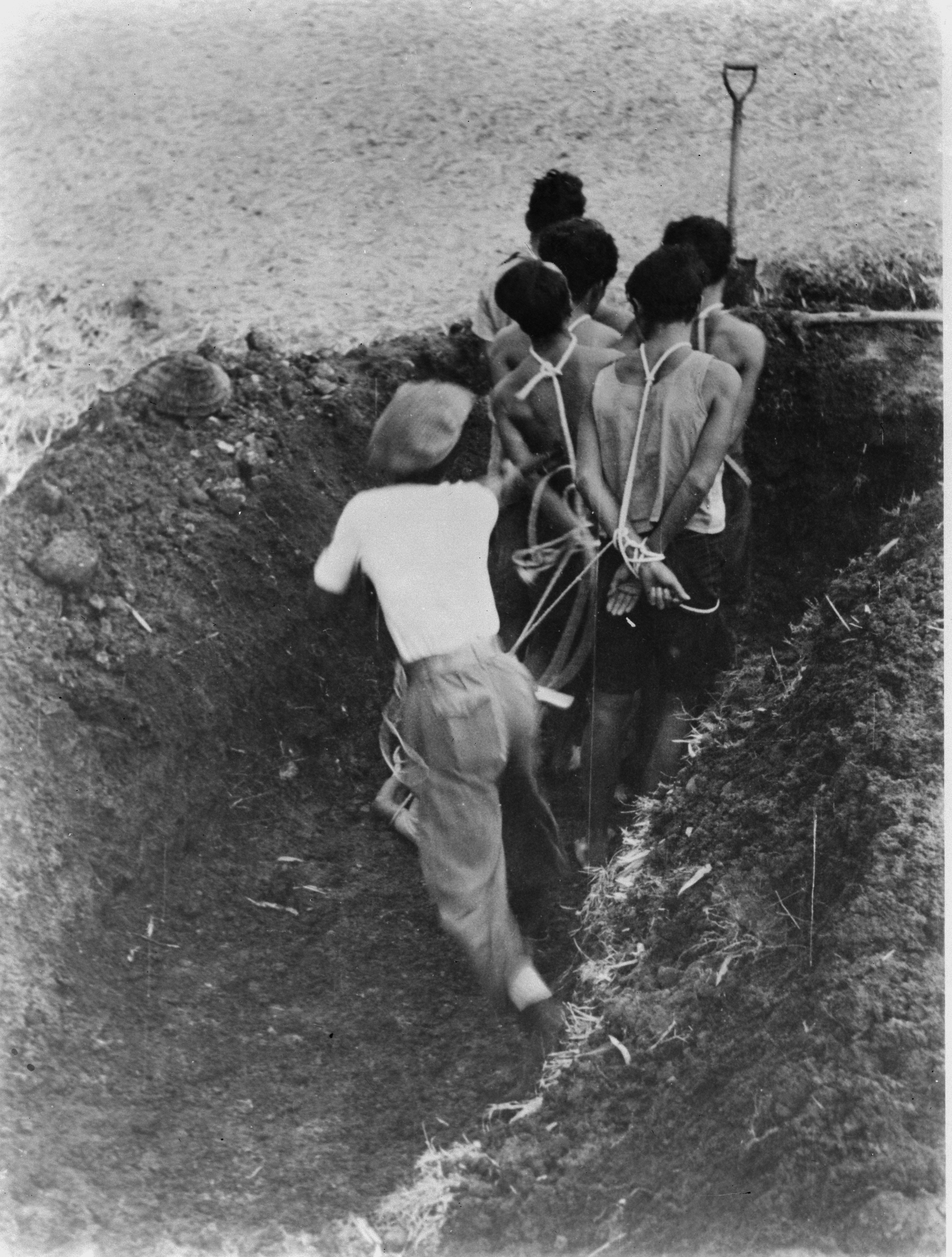 Collectie / Archief : Fotocollectie Dienst voor Legercontacten Indonesië Reportage / Serie : [DLC] Foto's gedode communisten door de TNI [gemaakt te Madioen, september 1948] Beschrijving : Gebonden mannen in een greppel worden "gebajonetteerd" door een beul, een man in een licht hemd Datum : september 1948 Locatie : Indonesië, Madiun, Nederlands-Indië Fotograaf : Fotograaf Onbekend / DLC Auteursrechthebbende : Nationaal Archief Materiaalsoort : Negatief (zwart/wit) Nummer archiefinventaris : bekijk toegang 2.24.04.02 Bestanddeelnummer : 8825